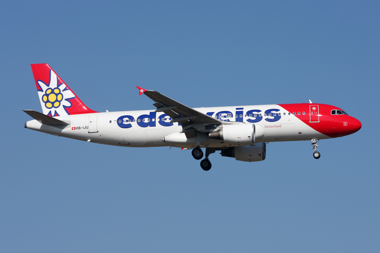 Zürich (- Kloten) (ZRH / LSZH) Switzerland 3.2016